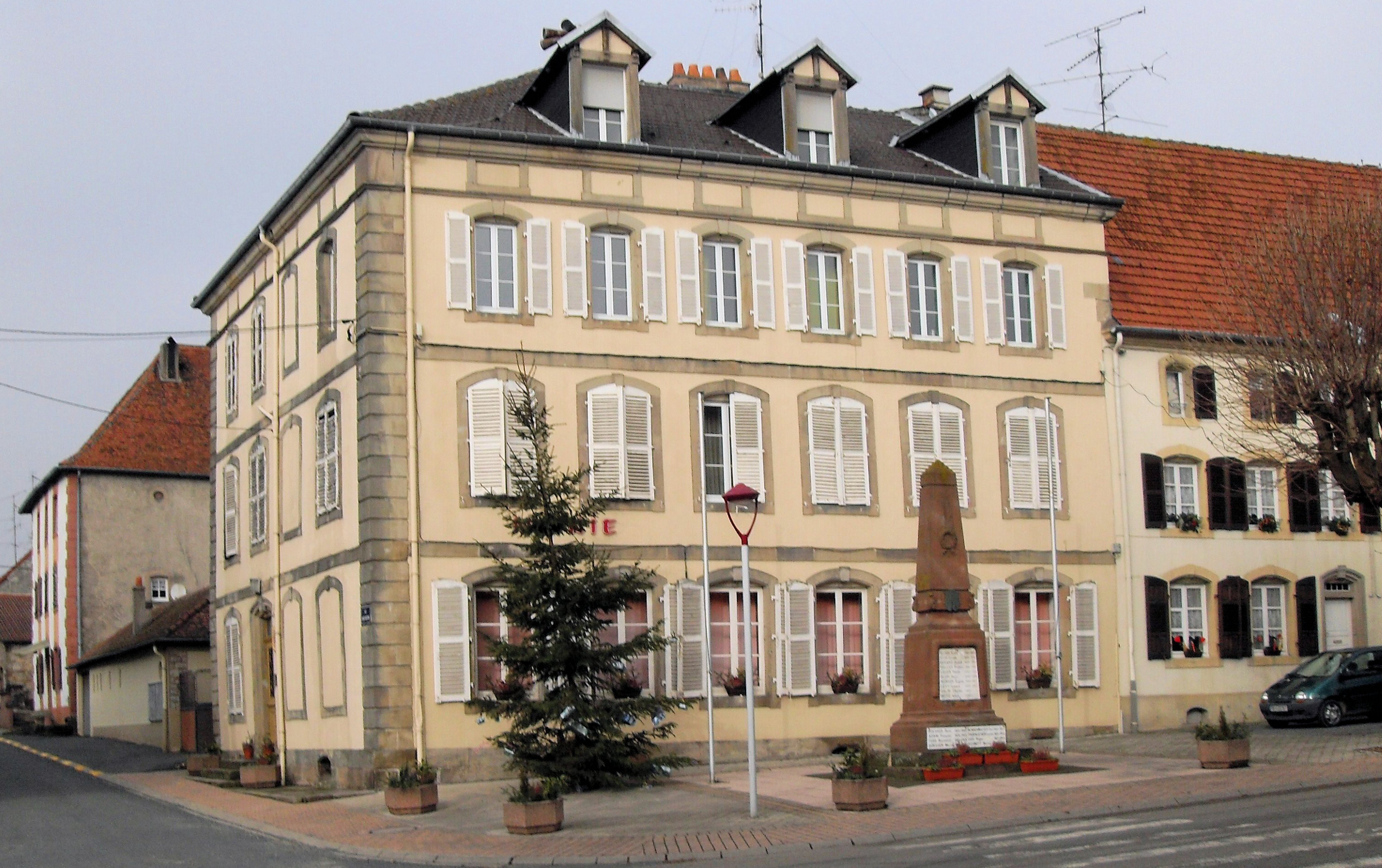 La mairie à Lixheim